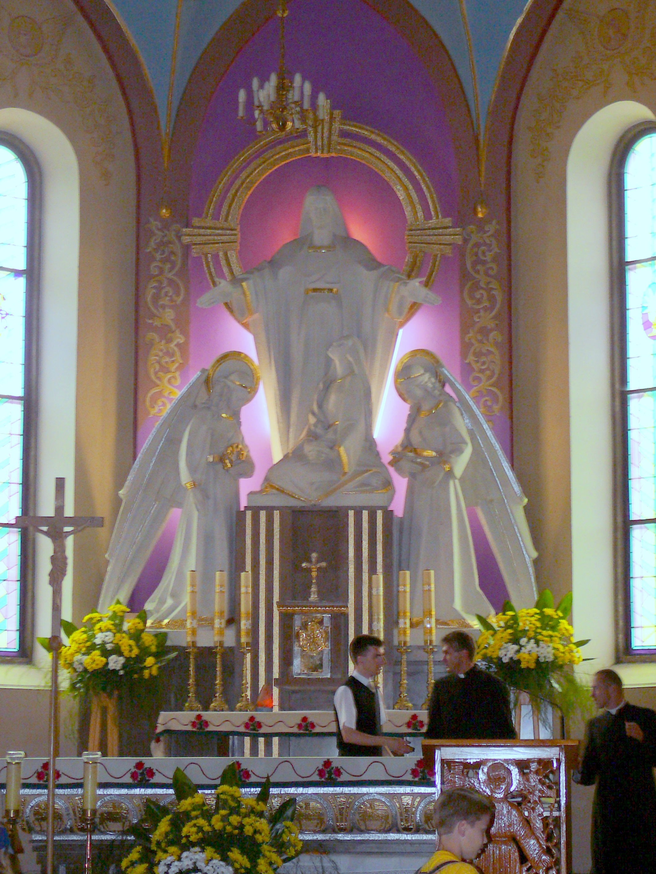 Ołtarz główny w kościele św.Marii Magdaleny w Poroninie